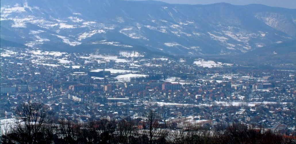 Vue panoramique de la ville de Bajina Bašta, en Serbie (district de Zlatibor)